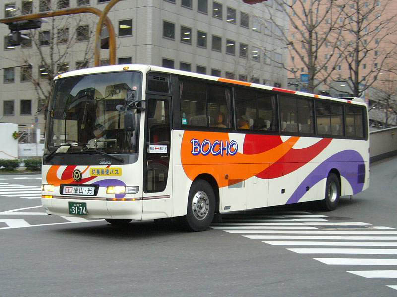 登録番号 山口う31-74 防長交通所属 福岡・周南ライナー用 2006年1月16日 博多駅交通センター附近にて撮影